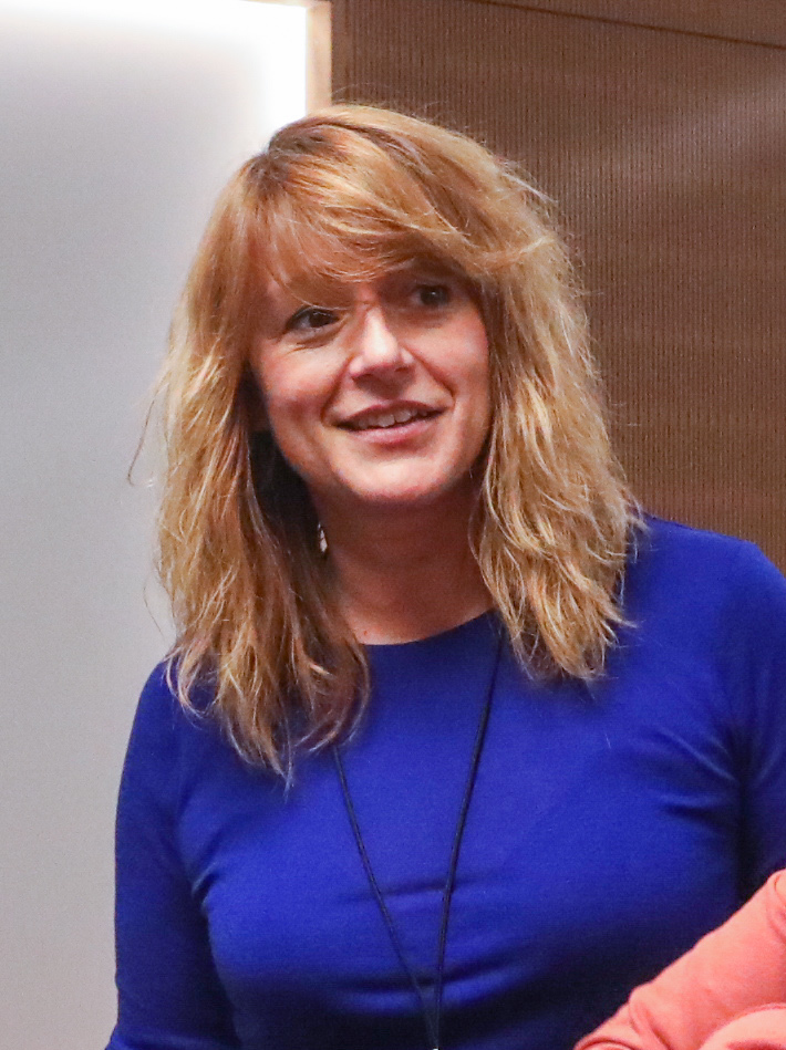 7M0A6981